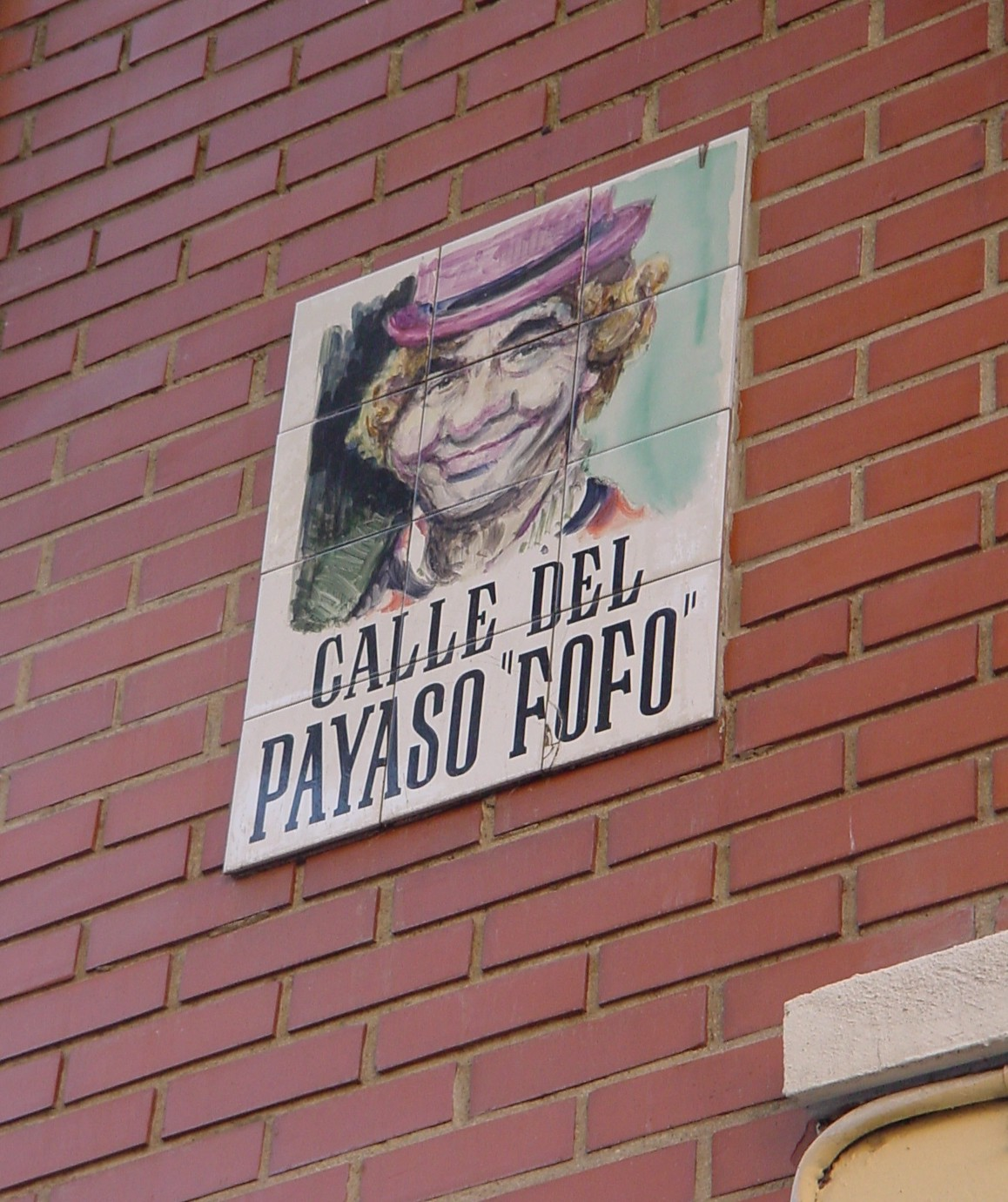 Placa de la calle Payaso Fofó